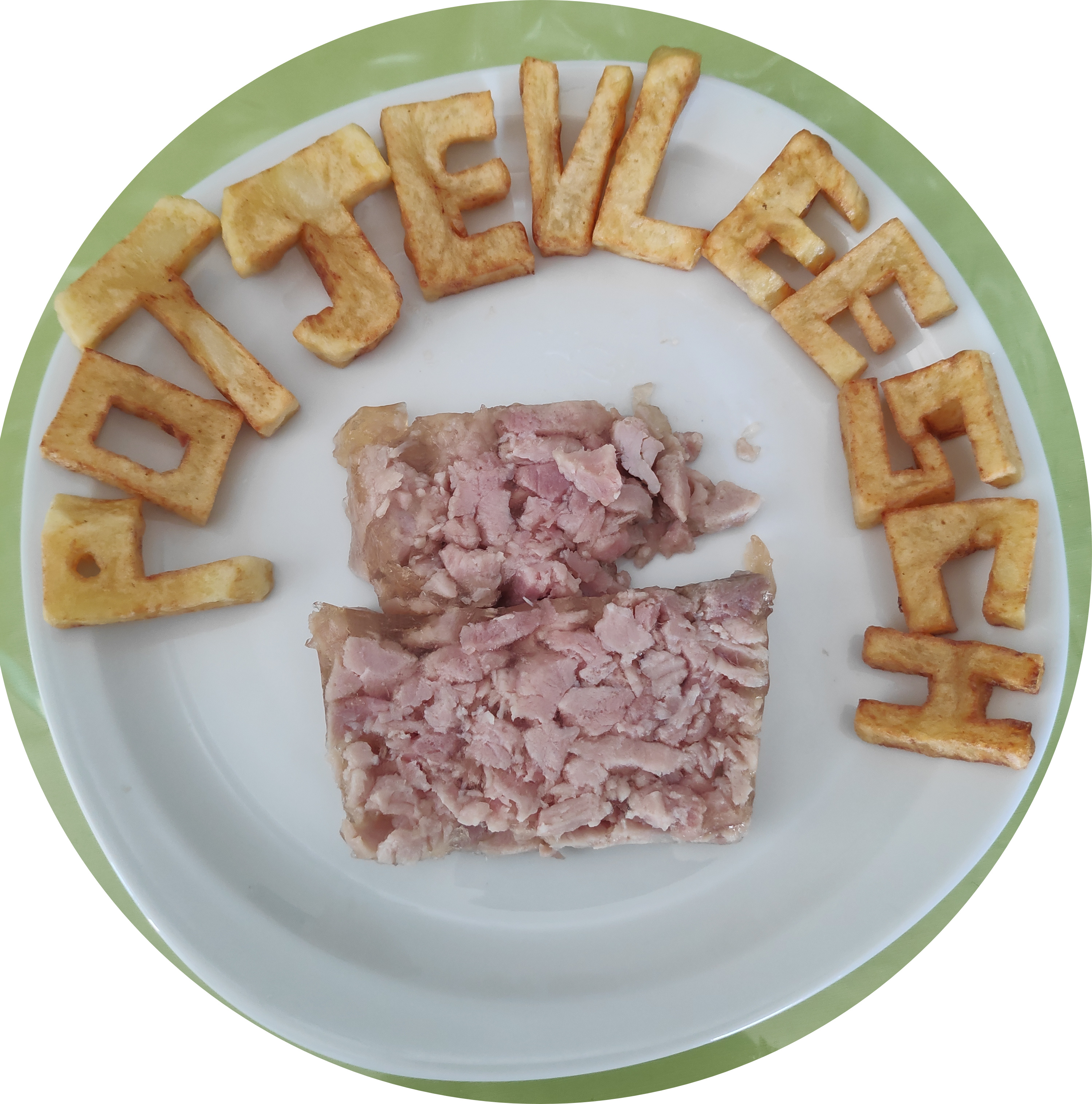 Potjevleesch avec pomme de terre en friture